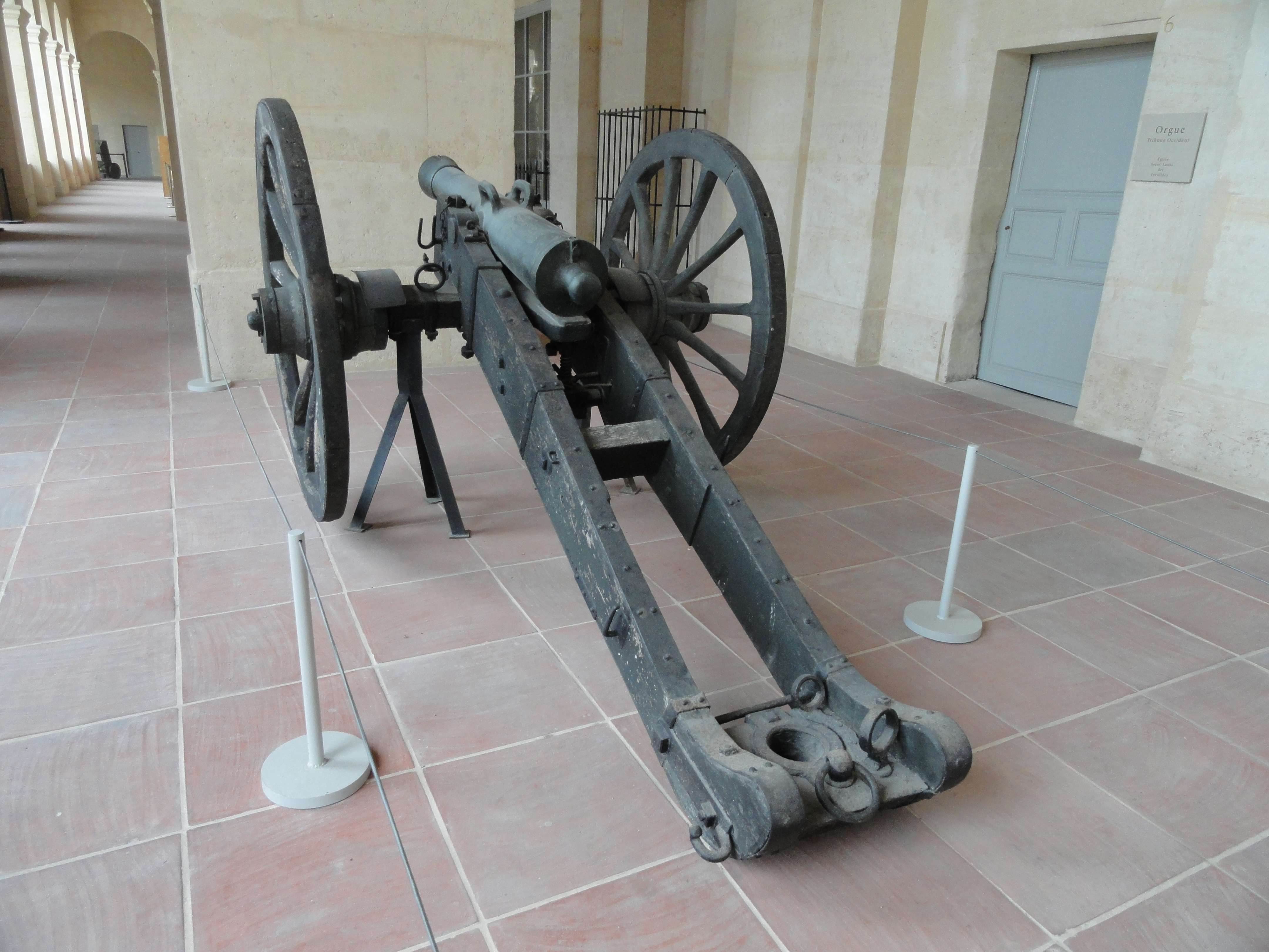 paris_invalides_napoleonic_gribeauval_gun_2